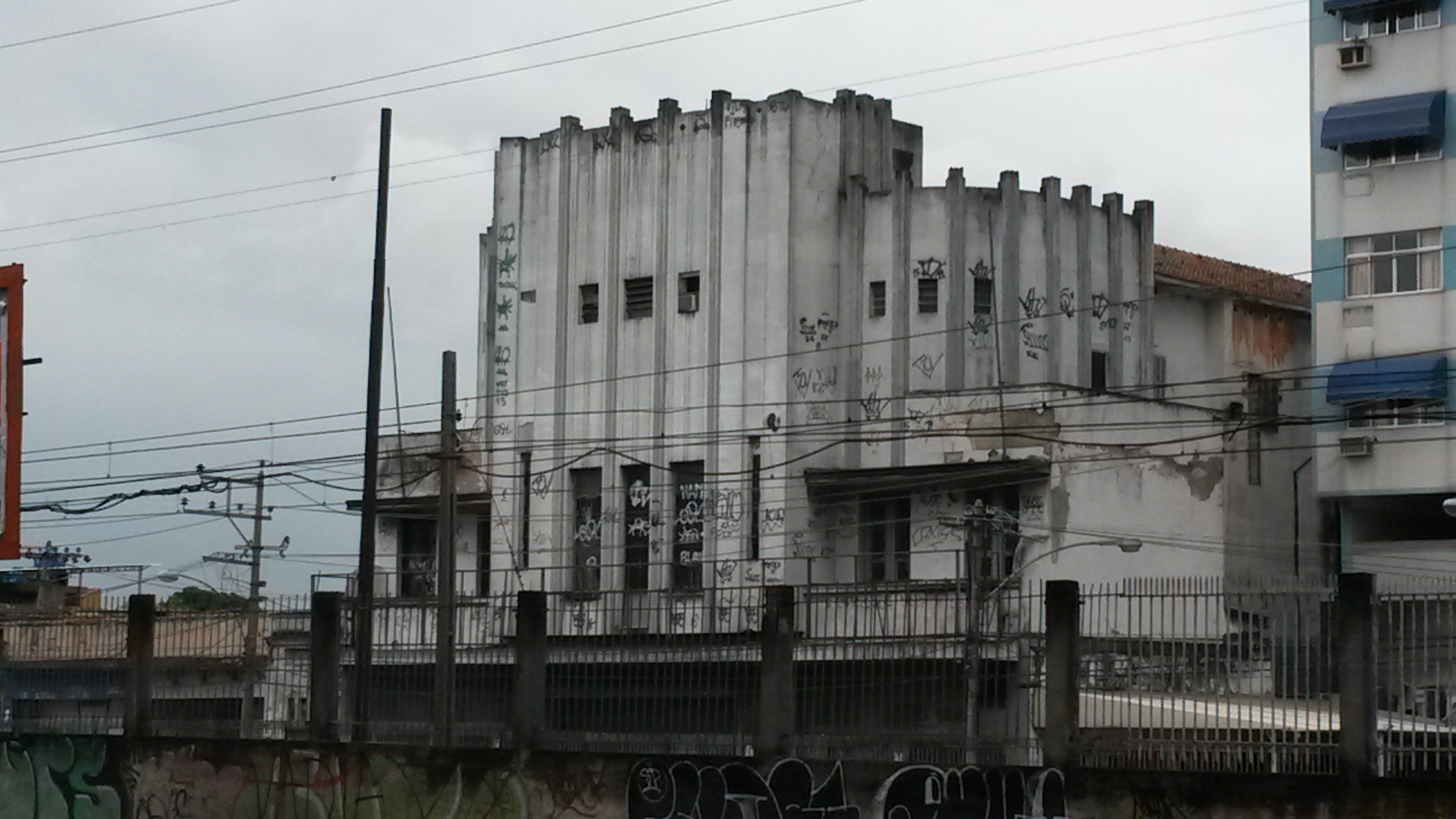 Cine Rosário, posteriormente conhecido como Cine Ramos e Boate Trogonometria